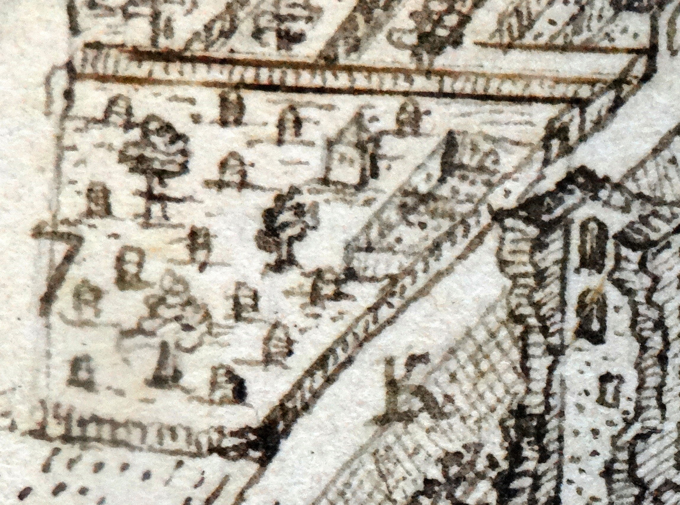 Zeichnung, nach 1689. Detail aus: Peter Hamman: Ansicht der Stadt Worms nach der Zerstörung 1689 von Süden. Stadtarchiv Worms, Abt. 1B, Nr. 48.